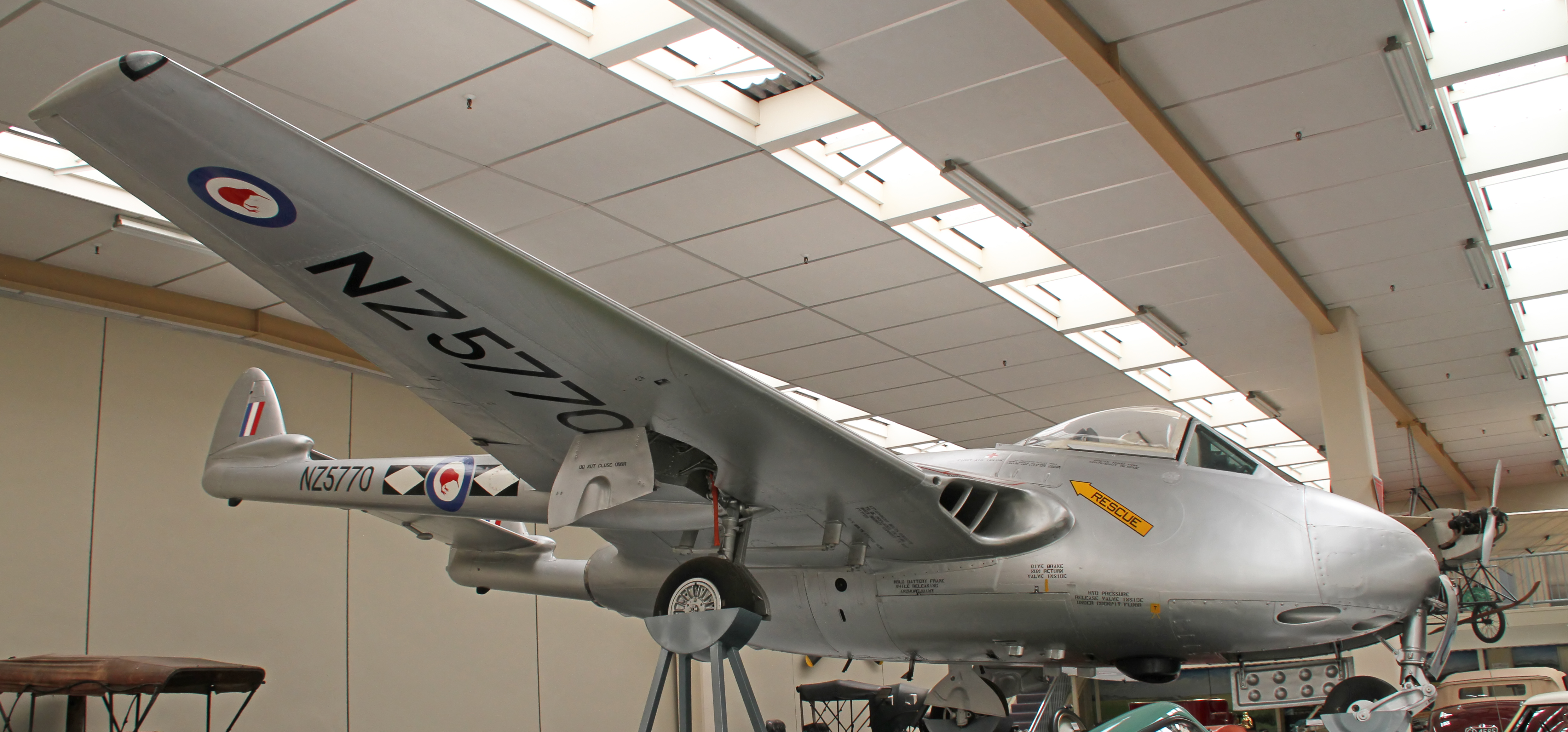 de Havilland Vampire NZ5770